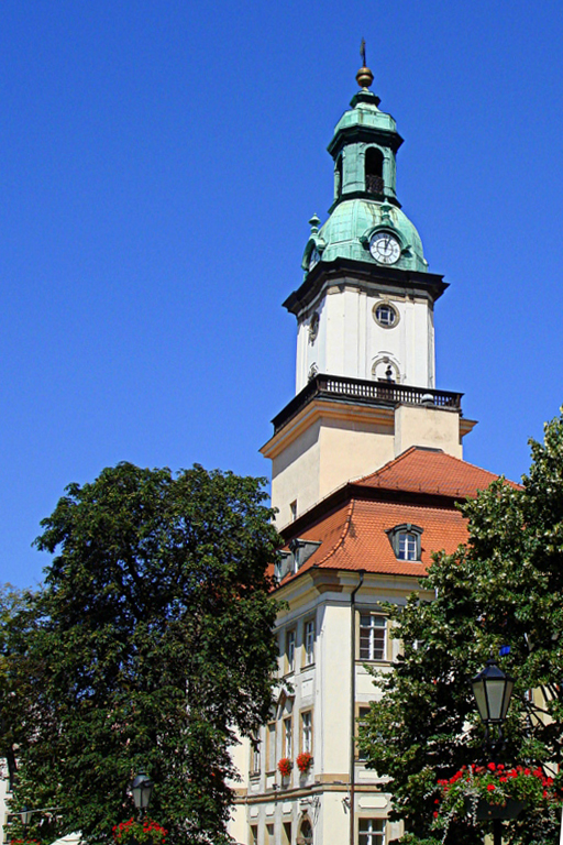 Ratusz i budynek biurowy wraz z łącznikiem, 1744-1749 pl. Ratuszowy 58, Jelenia Góra